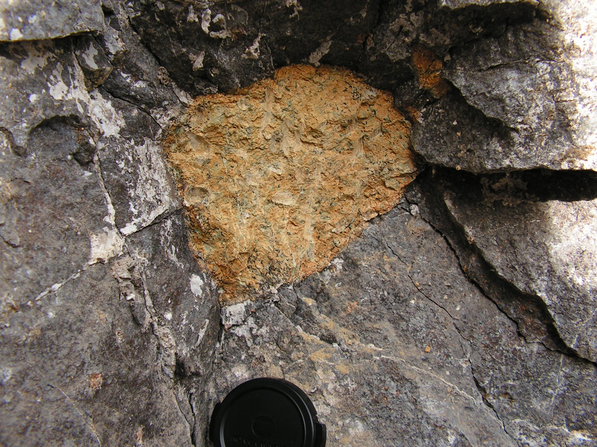 rounded, yellow weathered peridotite xenolith (mantle fragment) in a nephelinite lava flow. Kaiserstuhl, SW Germany / Gerundeter, gelblich verwitterter Peridotit-Xenolith (Erdmantel-Fragment) in einem Nephelinit-Lavastrom. Kaiserstuhl, SW-Deutschland.